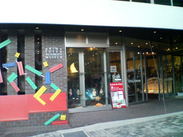 Arima Toys & Automata Museum (Arima=Gangu-Hakubutsukan, 有馬玩具博物館), Kobe City, Hyogo Pref., Japan (Entrance)